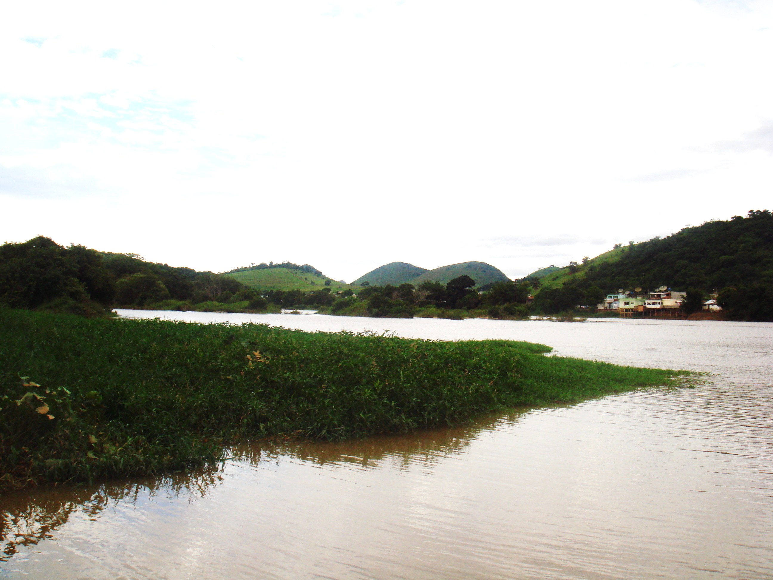 O rio Paraíba do Sul é fonte de muitas lendas populares em Três Irmãos